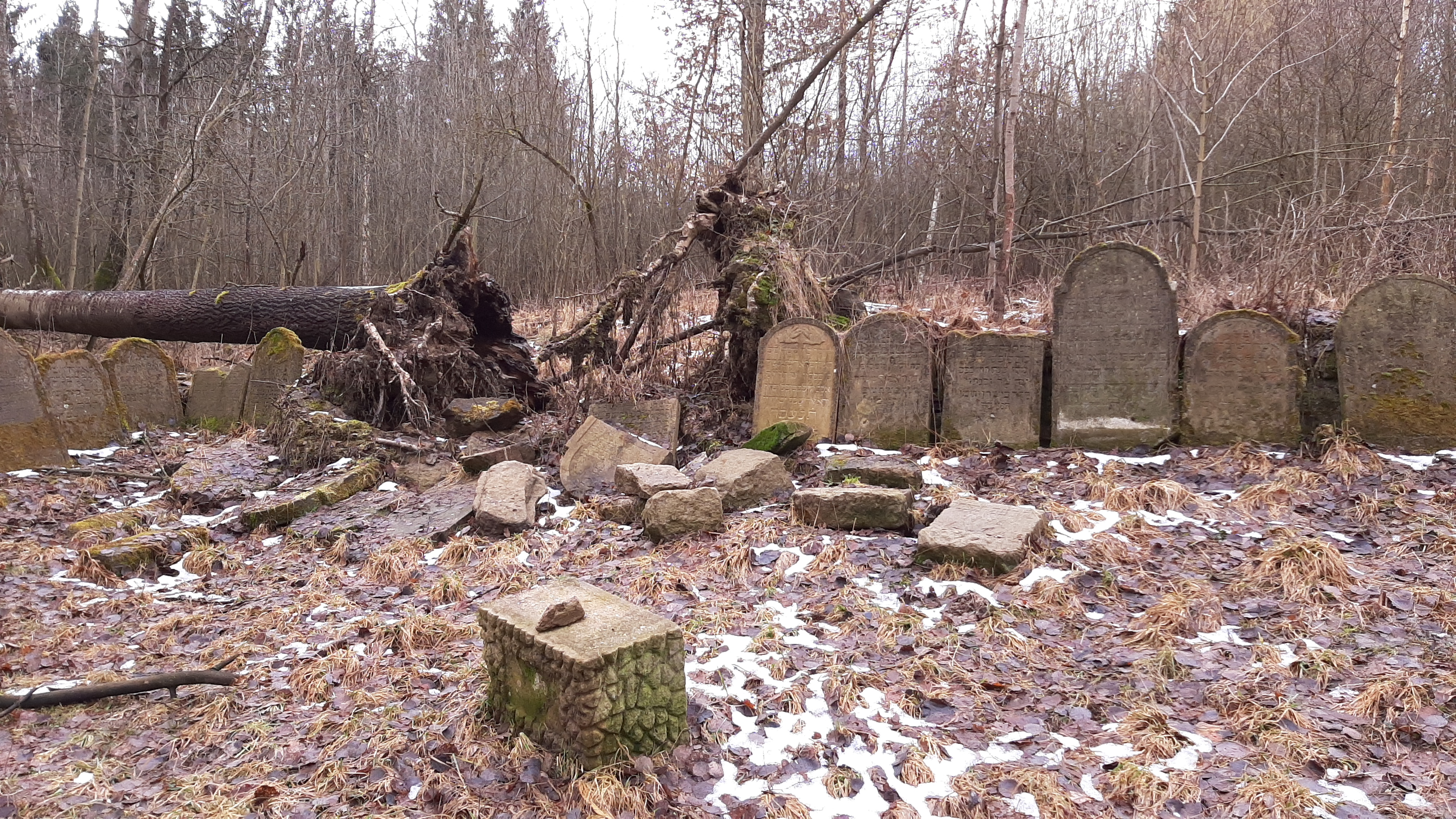 Židovský hřbitov v Bezdružicích, náhrobky poškozené padlým stromem po bouři v únoru 2020.